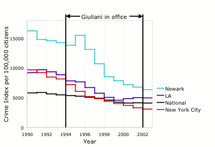 Fonte: Crime Rate in USA, NYC, LA, Newark 1990-2003 Licensing These data are from the FBI's Uniform Crime Reports, most of the recent ones are online: but the work is only the work related to the data. The image was original and is not a reproduction of any figure and was not generated by the government and it is: Under the header, "Crime in the United States," click on a year, then use Table 6. Data from pre-1995 is from the same FBI publication, "Crime in the United States." in hardcover book.